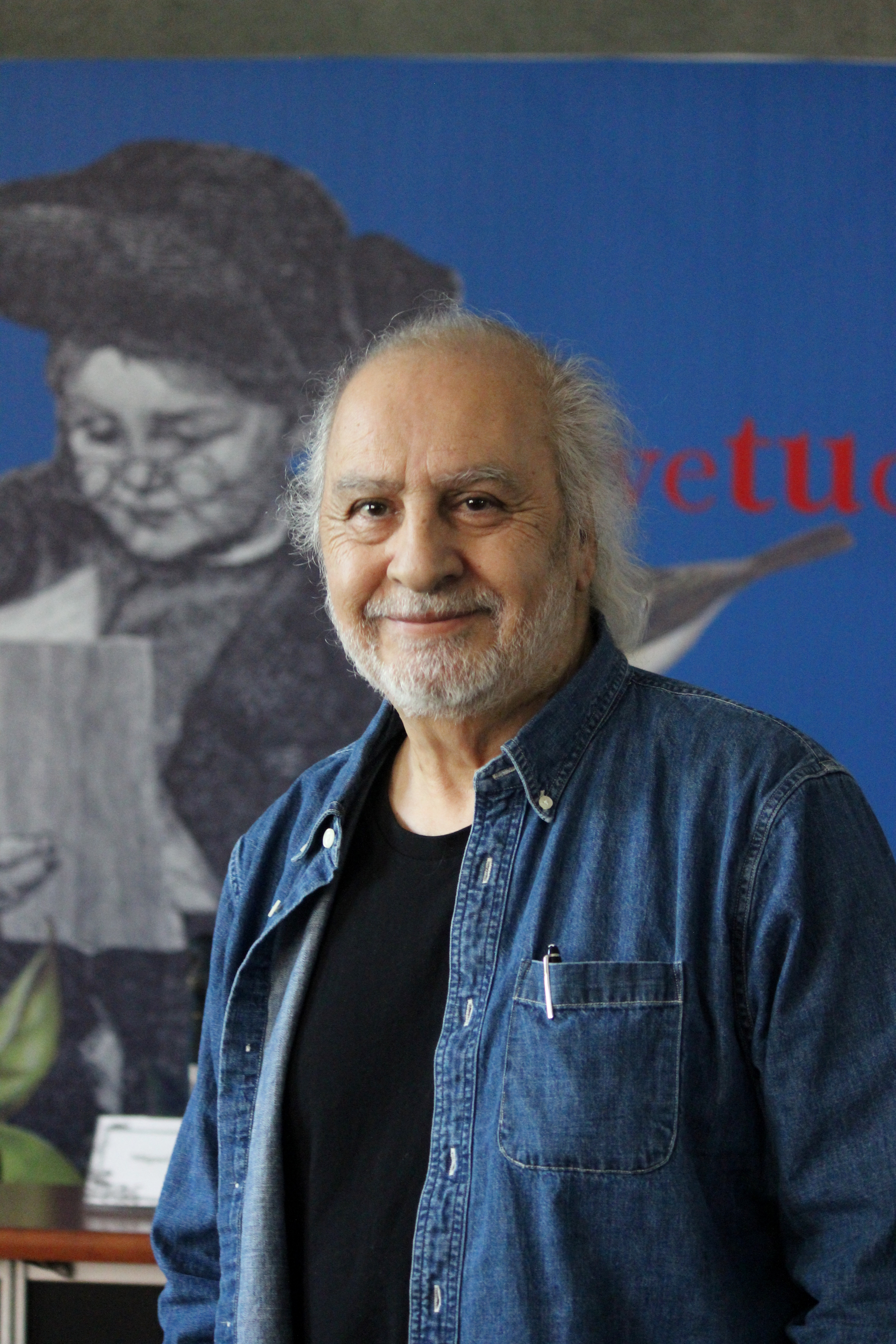 El director de cine chileno Miguel Littín en la Feria Internacional del Libro de Santiago 2018.